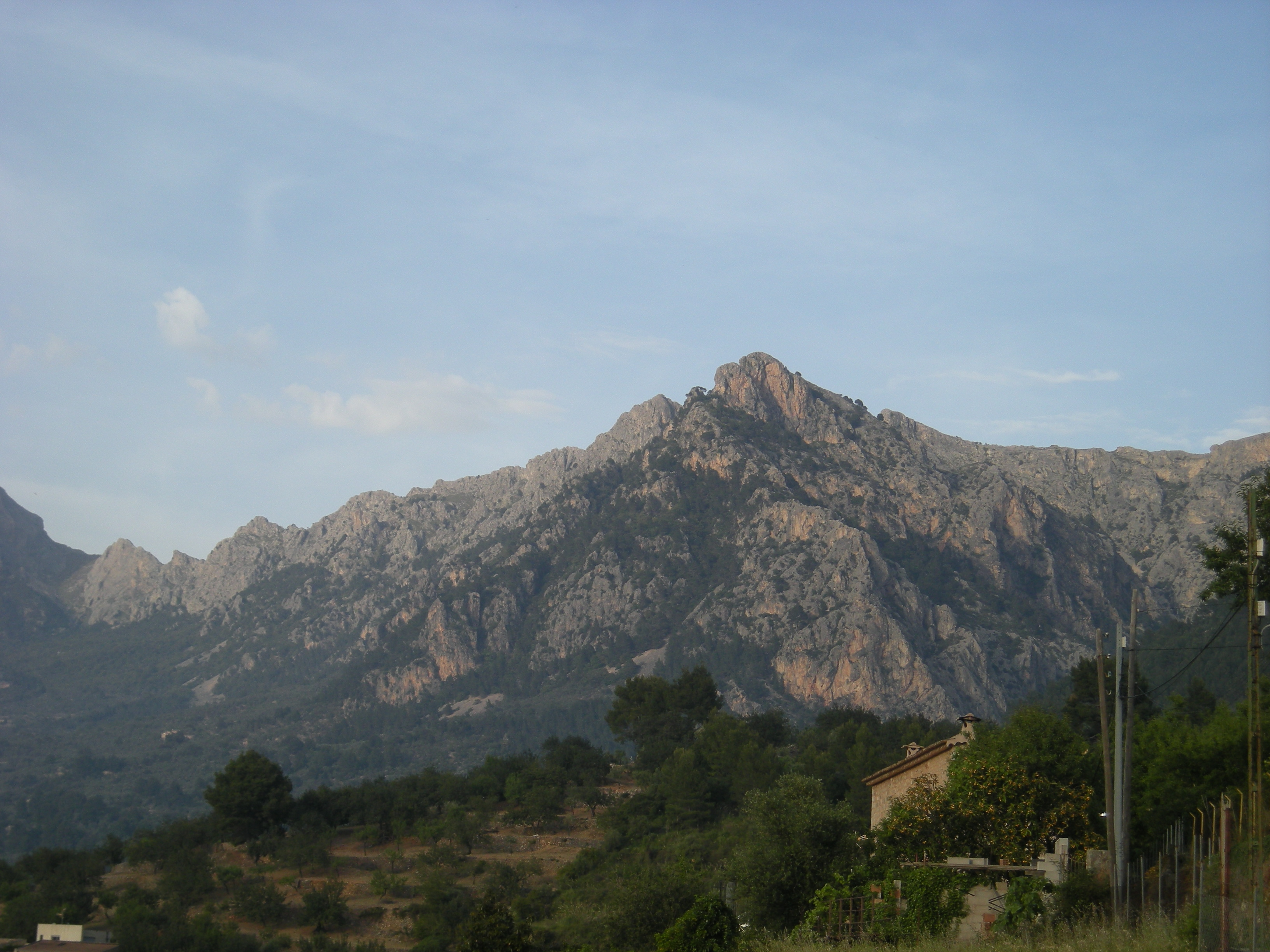 Serra de Son Torrella